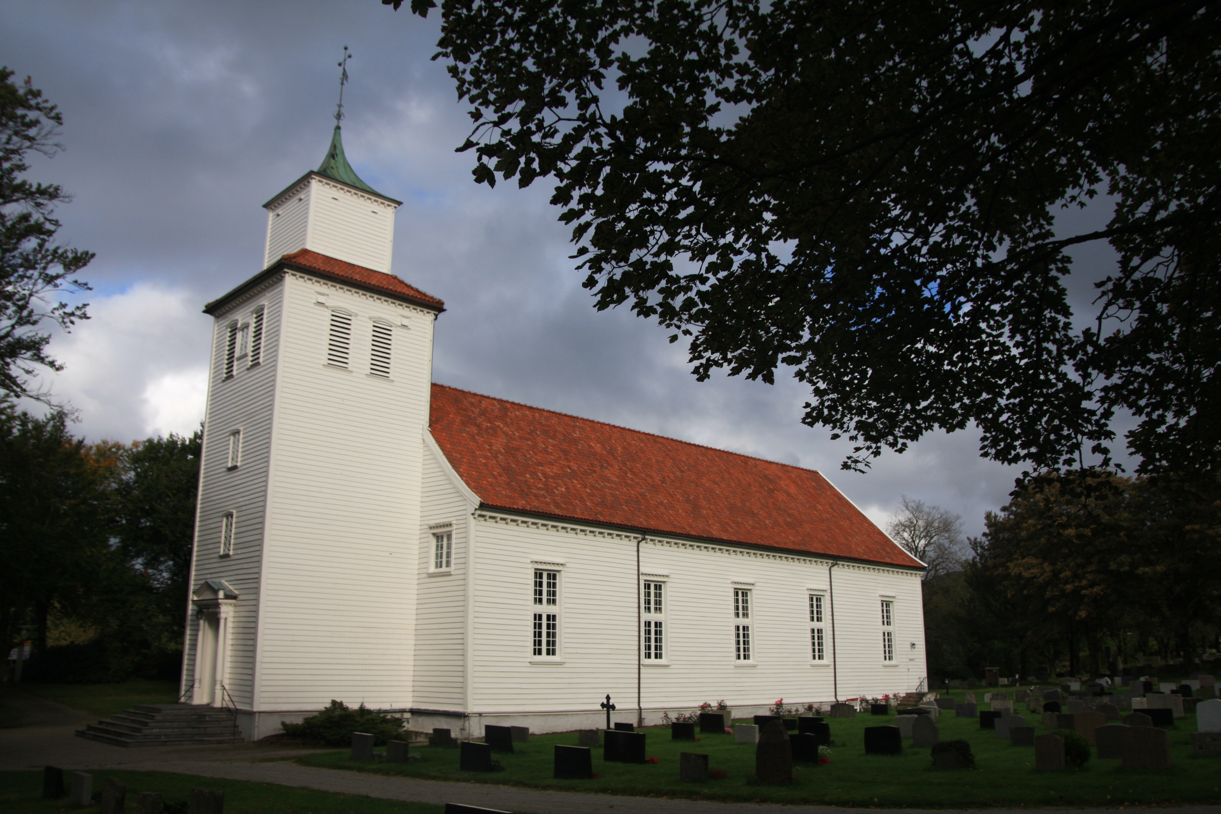 Høyland kirkested